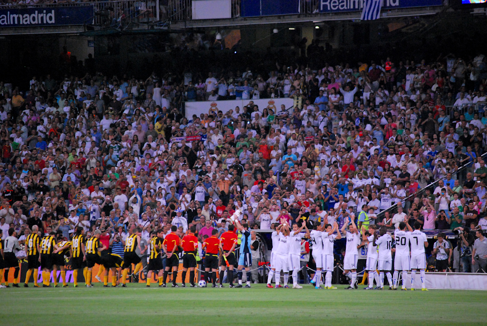 Trofeo Santiago Bernabeu 2010 Real Madrid 2 - Peñarol 0